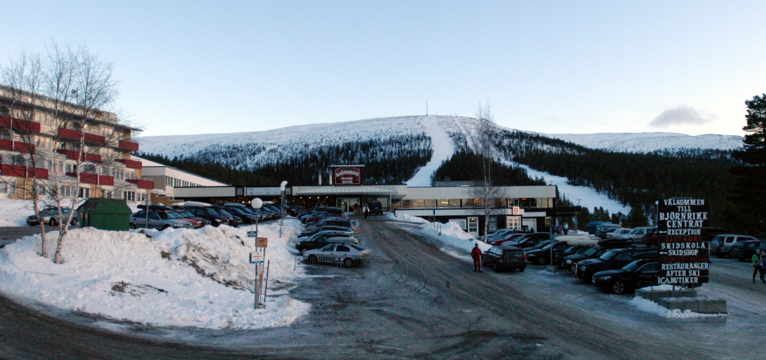 The skiresort Björnrike in Sweden.